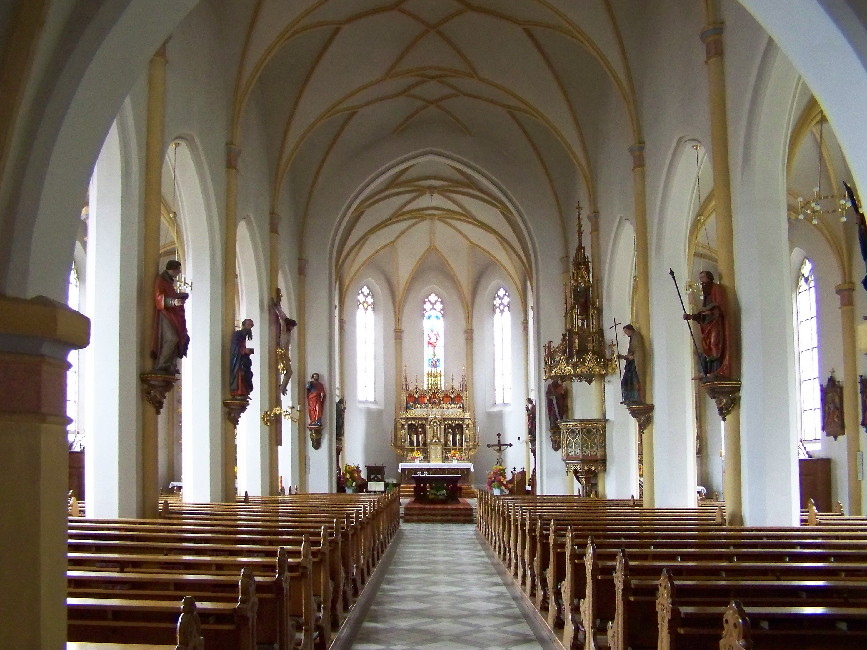 Rottenburg an der Laaber. Katholische Pfarrkirche St. Georg. Dreischiffiger Innenraum.